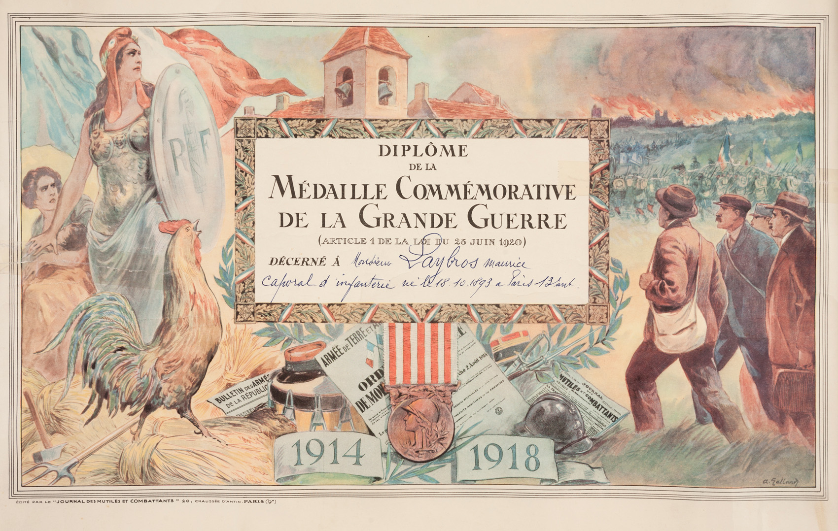 Maurice LAYBROS est caporal infirmier au 3e RMTA (Régiment de Marche de Tirailleurs Algériens). Gravement blessé par deux fois lors du conflit, plusieurs fois cité, il est récipiendaire de nombreuses décoration (croix du combattant, croix de guerre, médaille militaire). Il est aussi fait Chevalier de la Légion d'Honneur le 5 juin 1957.